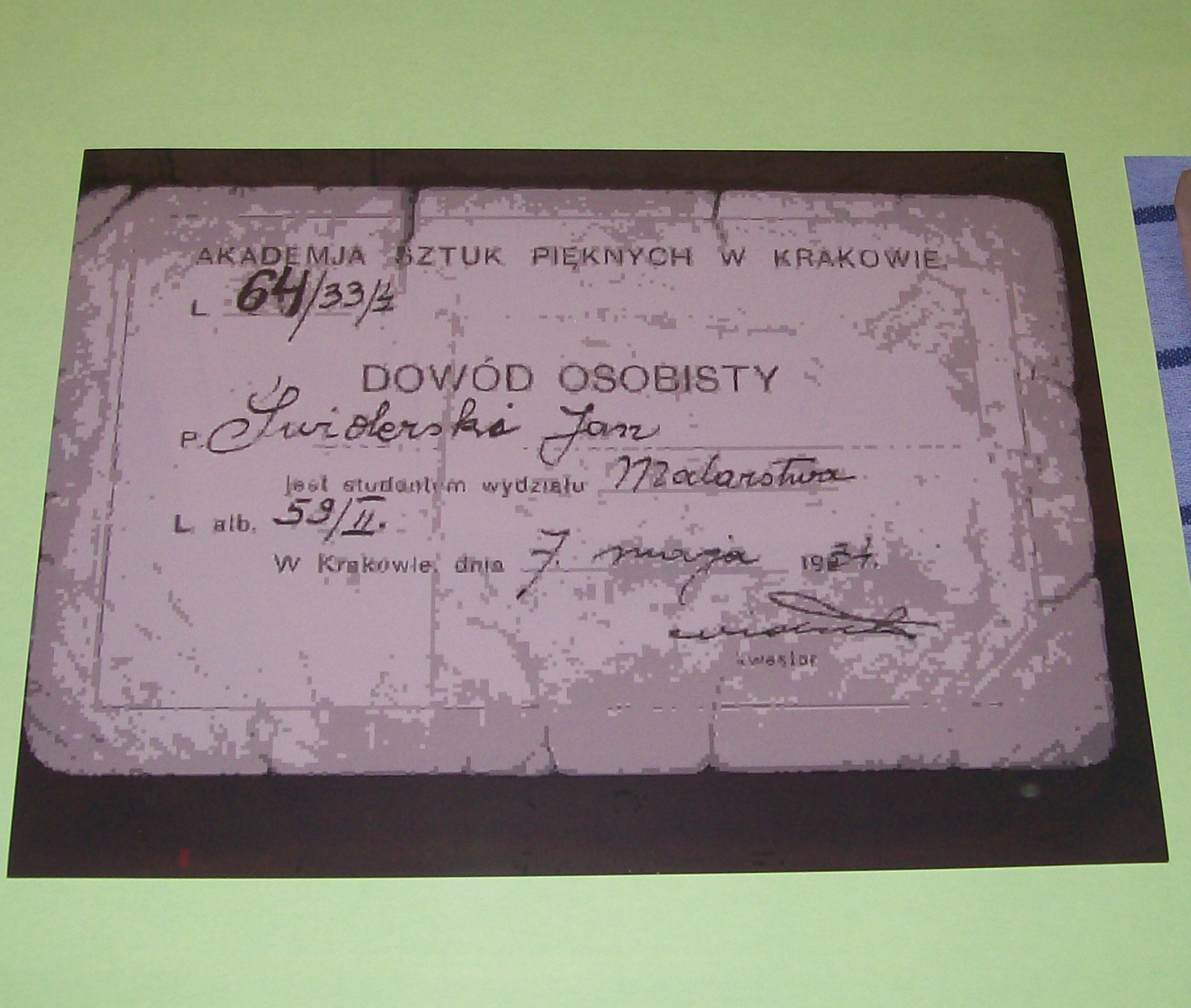 Jeden z dokumentów Jana Świderskiego ze zbiorów Muzeum Zagłębia w Będzinie